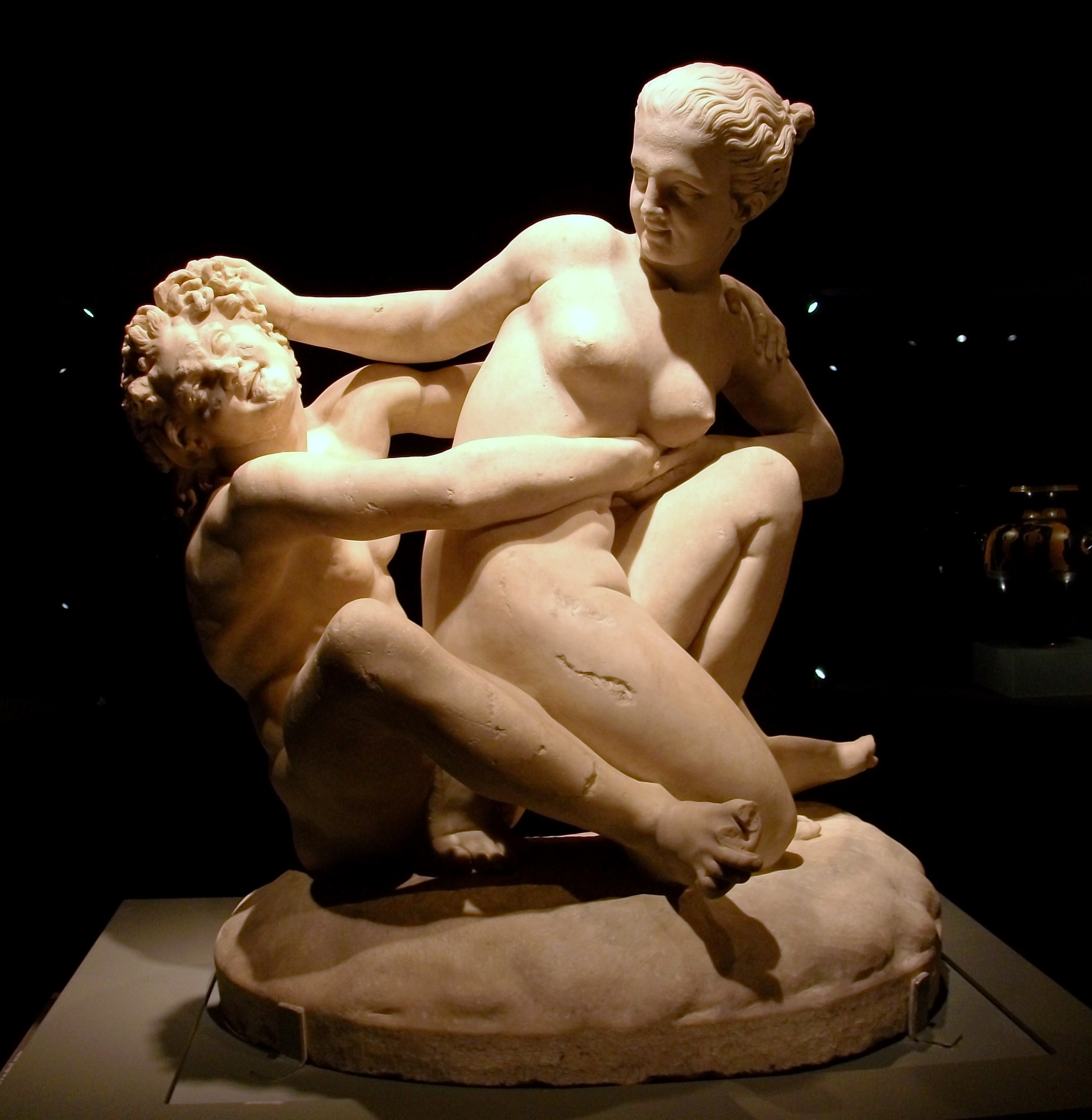 Sàtir i nimfa, intent de violació, exposició de la Bellesa del Cos, Museu Arqueològic d'Alacant. Aquesta jove que forceja per escapar d'un sàtir és una nimfa, ésser sobrenatural associat a la naturalesa. Els sàtirs eren éssers mítics de cos en part humà però amb potes, cua i orelles de cavall. Era habitual representar les nimfes, éssers singulars, nues i moltes vegades víctima d'agressió sexual de sàtirs. Aquesta classe d'imatges eren una modalitat de pornografia que omplia les fantasies masculines sobre relacions sexuals desenfrenades en una societat en què entre ciutadans i dones respectables estaven estrictament regulades. Aquesta és una de tantes còpies romanes d'una obra anterior grega dels segles II i I a. C. que no s'ha conservat. El magistral entrellaçament dels cossos en una composició complexa prevista per ser vista des de qualsevol posició, és característic de l'art grec tardà.